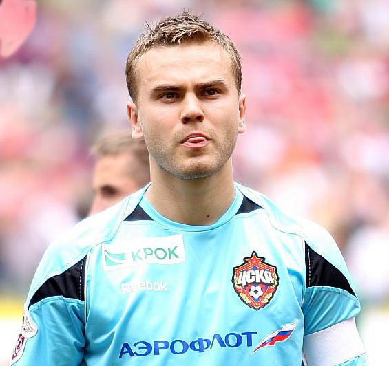 Igor Akinfeev